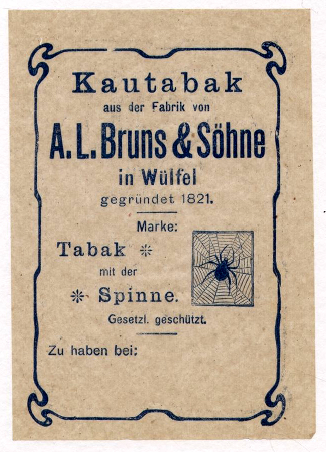 Ein Stück Einwickelpapier für Kautabak aus der 1821 gegründeten Fabrik von A. L. Bruns & Söhne in Wülfel vor Hannover. Das Blatt mit einem Schmuckrand im Jugendstil und einem Abdruck des Markenzeichens des Unternehmens, eine Spinne im Spinnennetz, hat die Maße circa 9,8 cm x 14,3 cm ...